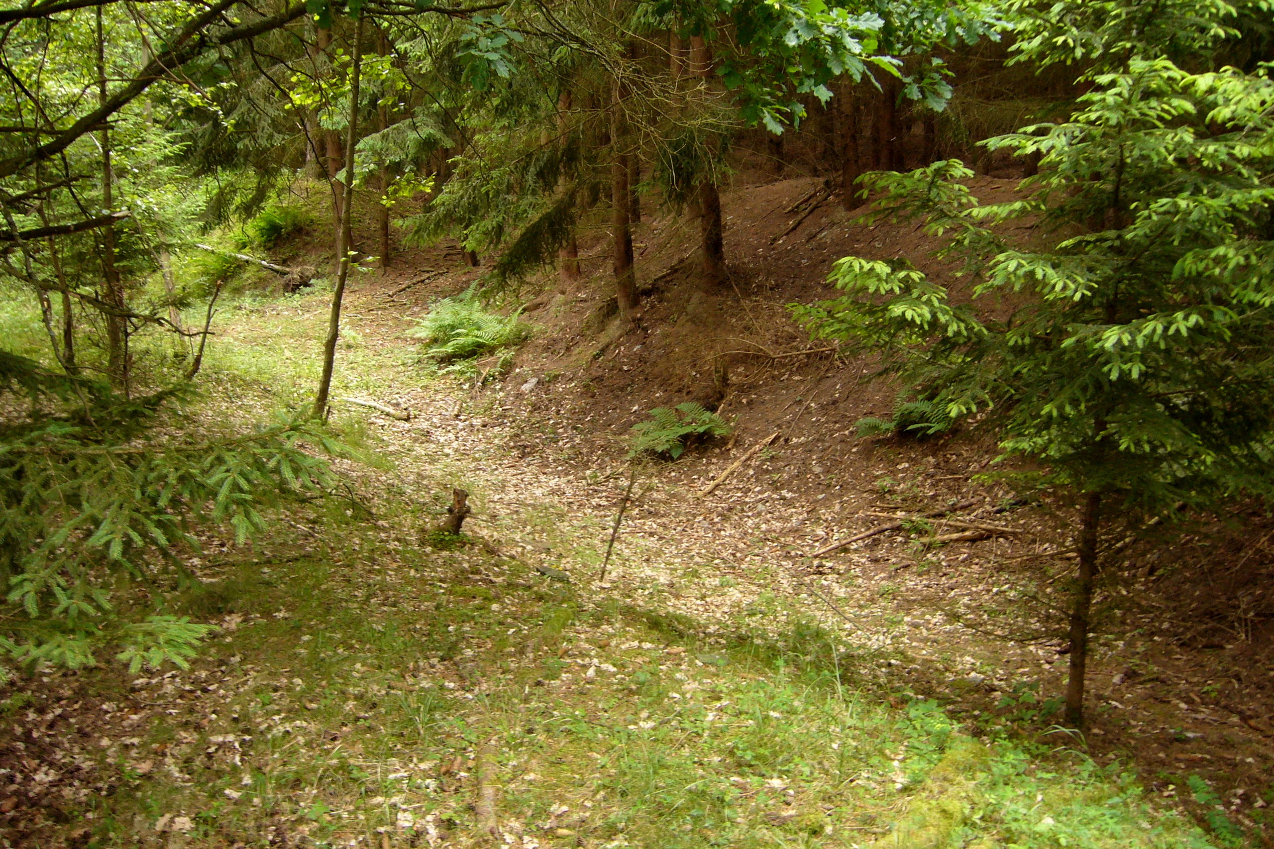 Příkop na severní straně hradu